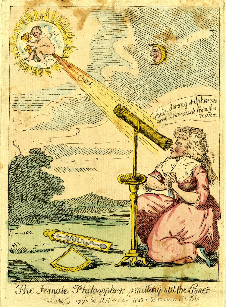 Сатирическая гравюра